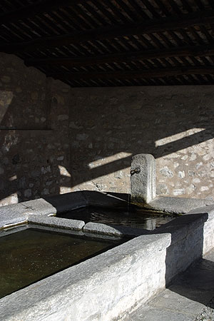 Waschbrunnen (Waschhaus) in